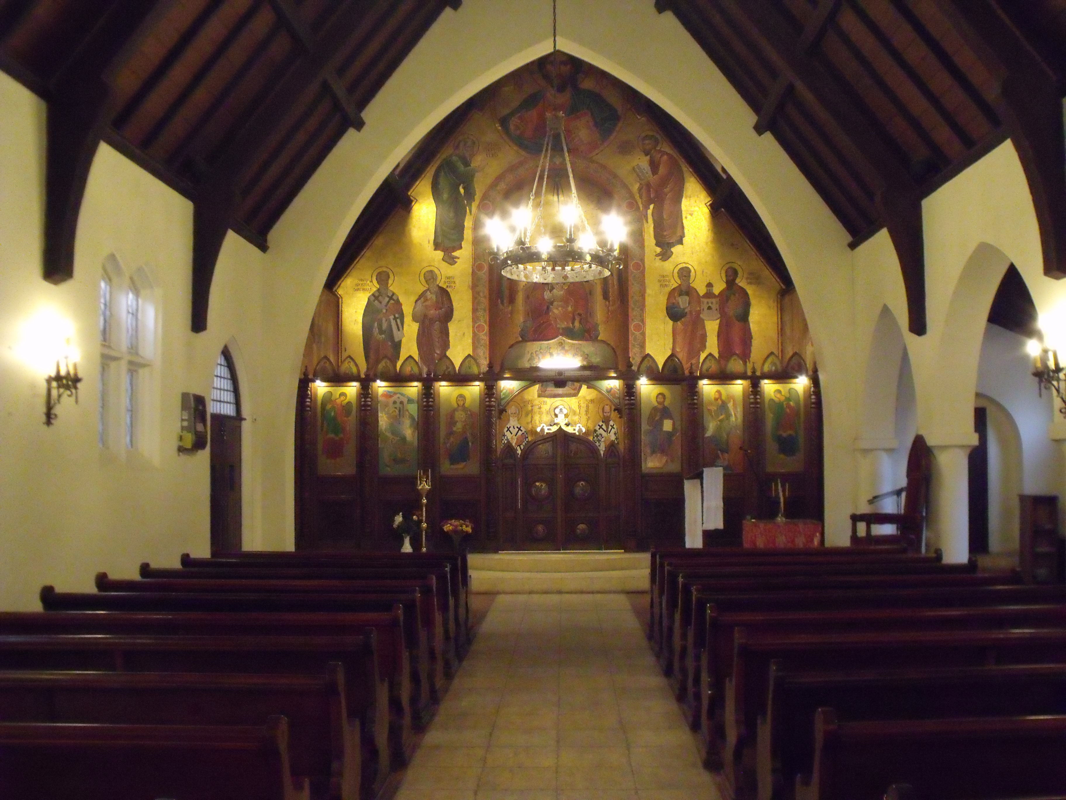 vista completa interior